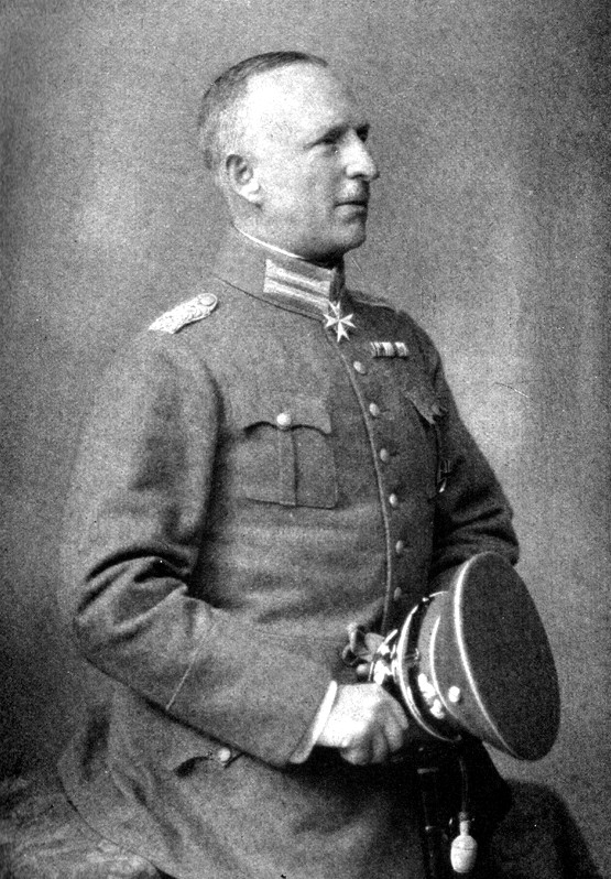 Oberstleutnant Hans Kloebe